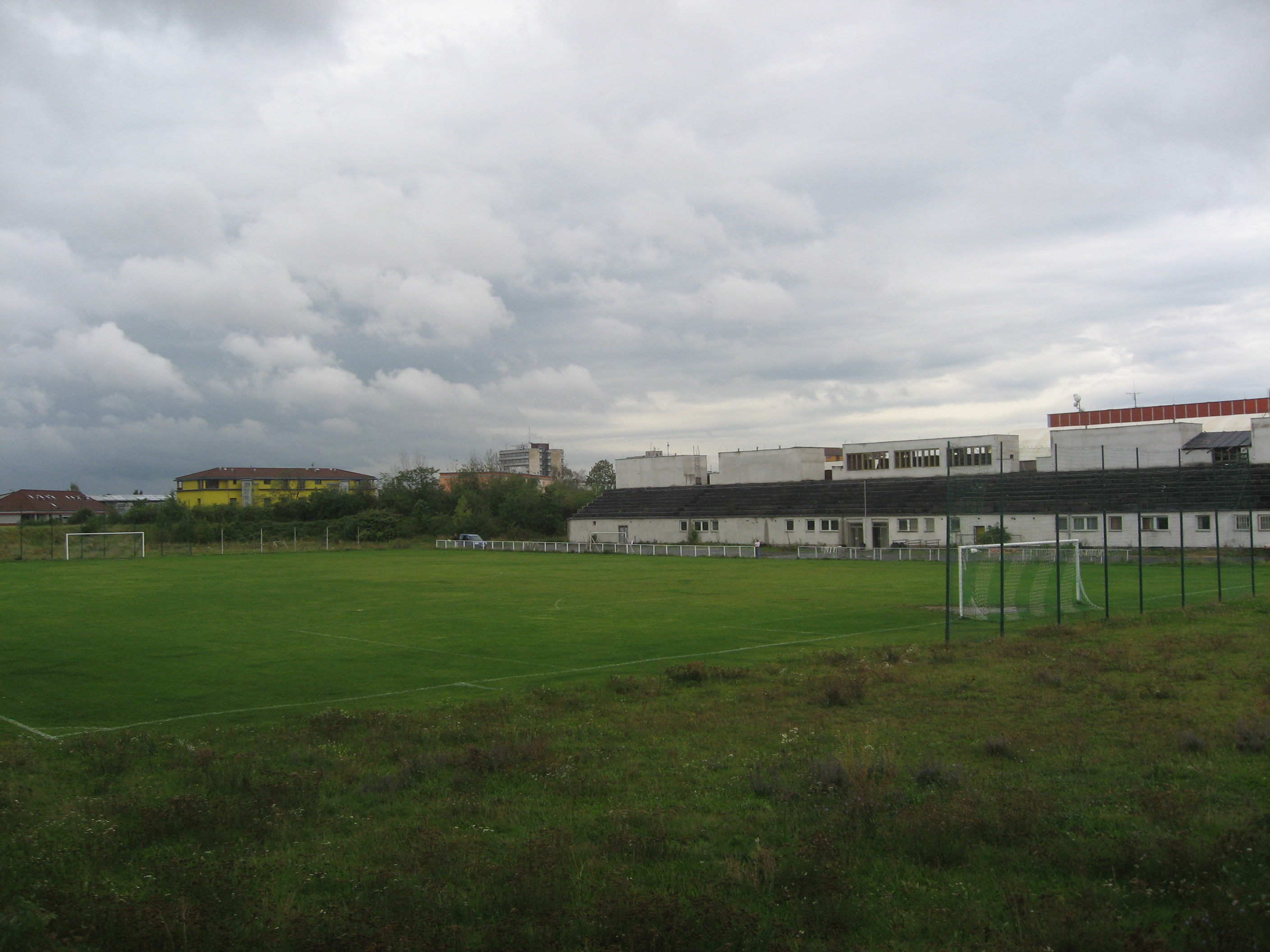 Fotbalový stadion AFK Union Žižkov ve Vysočanech, Na Balkáně